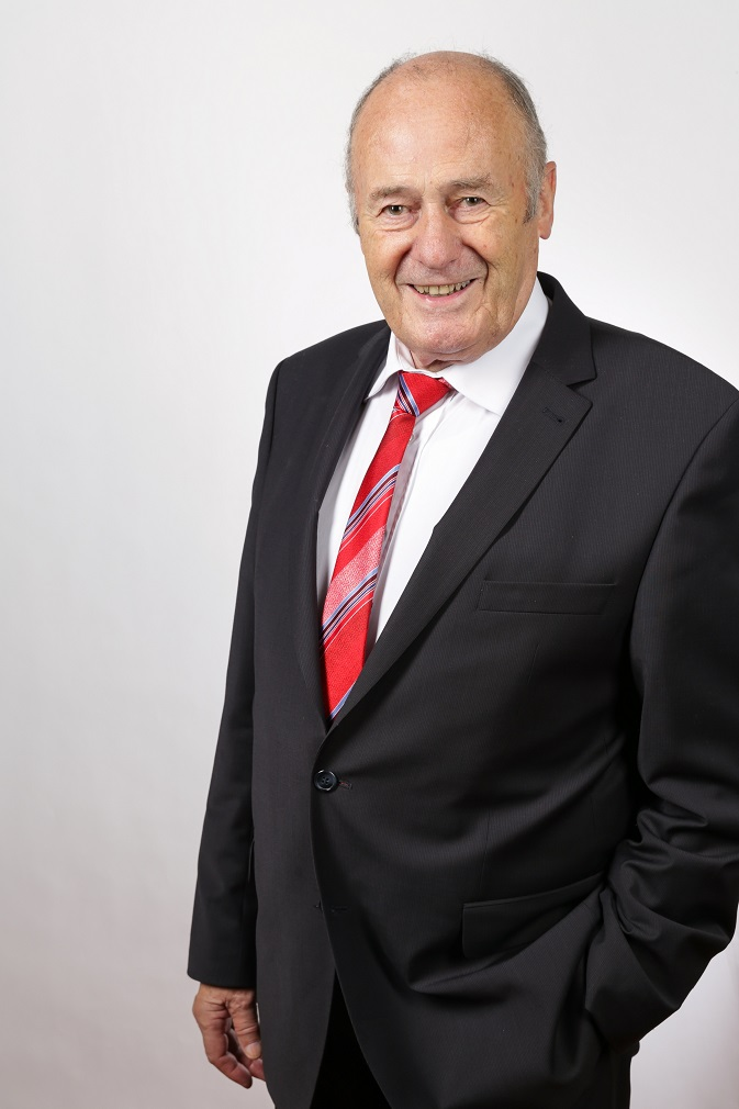 Portrait Bild des Autors Schittly